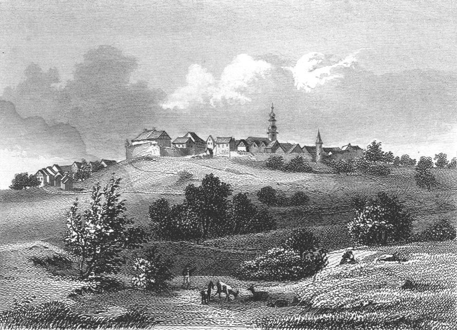 Herbstein, 1849, Stahlstich auf Papier · schwarz-weiß